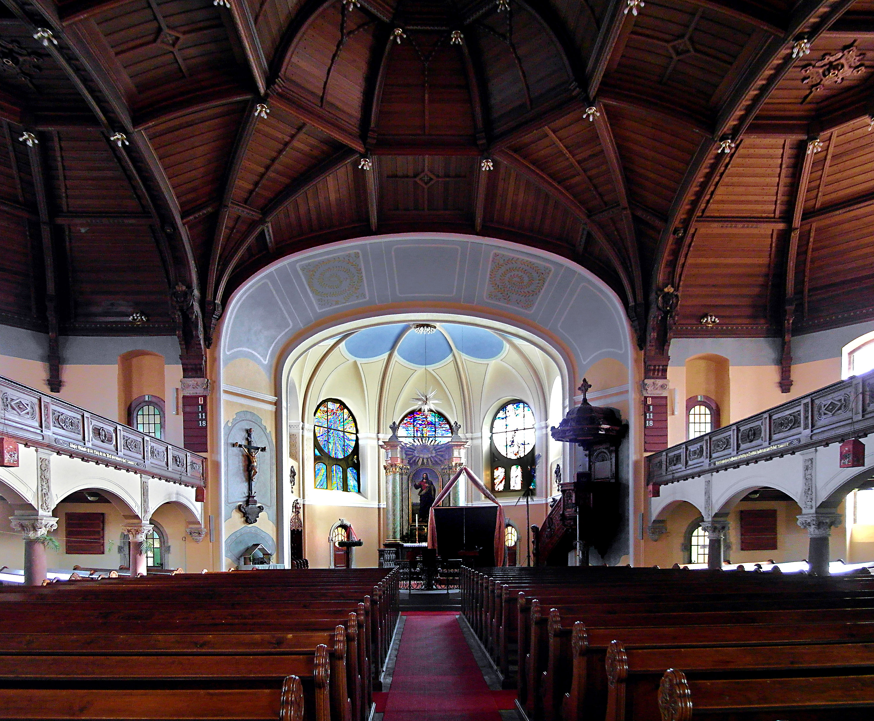 02.12.2012 01187 Dresden-Plauen, Reckestraße 6 (GMP: 51.028935,13.704658): Ev.-Luth. Auferstehungskirche. 700jährige Vorgeschichte mit vielen Umbauten. Früher hieß sie Michaeliskirche. Nach dem letzten großen Erweiterungsbau erhielt sie 1903 den Namen Auferstehungskirche. Architekten waren William Lossow und Hermann Viehweger. Die Glasfenster im Alttarraum schuf der Dresdner Wolfgang Korn 2000 bis 2003 neu. Einzigartige Eichenholzdecke. [SAM5211&13&15.JPG]20121202120MDR.JPG(c)Blobelt